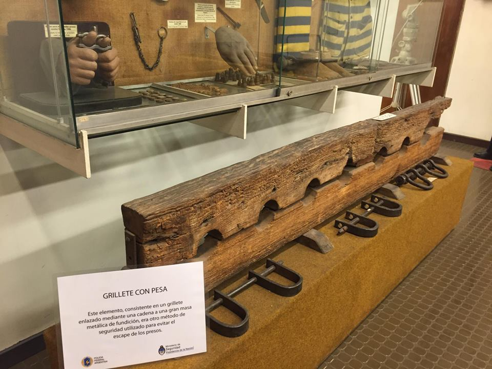 Grilletes para presos